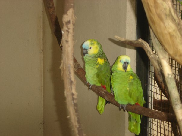 Amazona amazonica